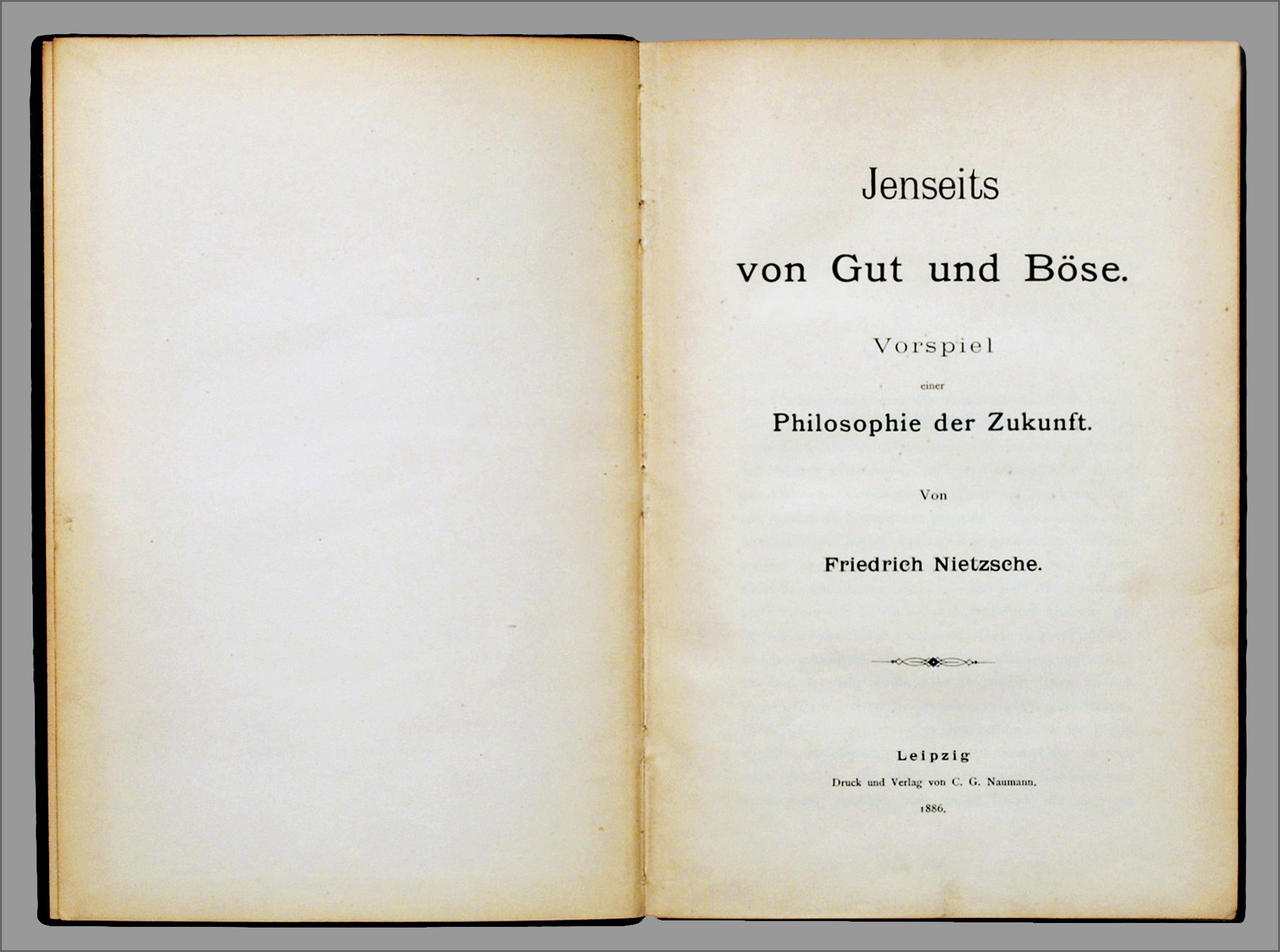 Nietzsche, Friedrich: Jenseits von Gut und Böse. Vorspiel einer Philosophie der Zukunft. Leipzig: Naumann. 1886, 271 S., Erstausgabe. Groß-Oktav.